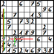 Sudoku